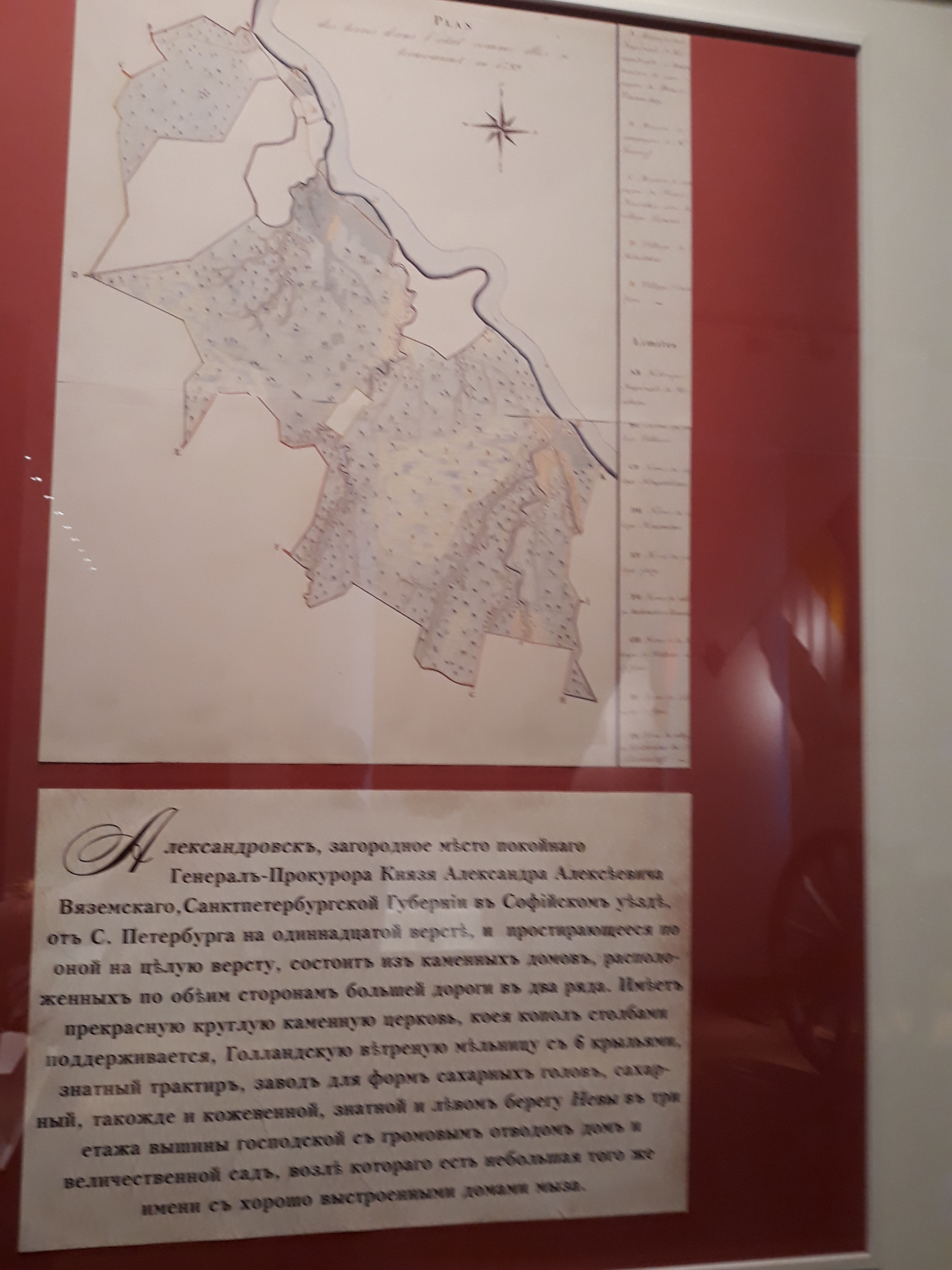 "Александровск, загородное место покойного Генерал-Прокурора Князя Александра Алексеевича Вяземского, Санкт-петербургской губернии в Софийском уезде, от Санкт-Петербурга на 11 версте и простирающегося по оной на целую версту. Состоит из каменных домов, расположенных по обеим сторонам каменной дороги в два ряда. Имеет прекрасную круглую каменную церковь, коея копол столбами поддерживается, голландскую ветряную мельницу с шестью крыльями, знатный трактир, завод для форм сахарных голов, сахарный, такожде и кожевенный, знатной и левом берегу Невы в три этажа вышины господский с громовым отводом дом и величественный сад возле которого есть небольшая того же имени с хорошо выстроенными домами мыза."